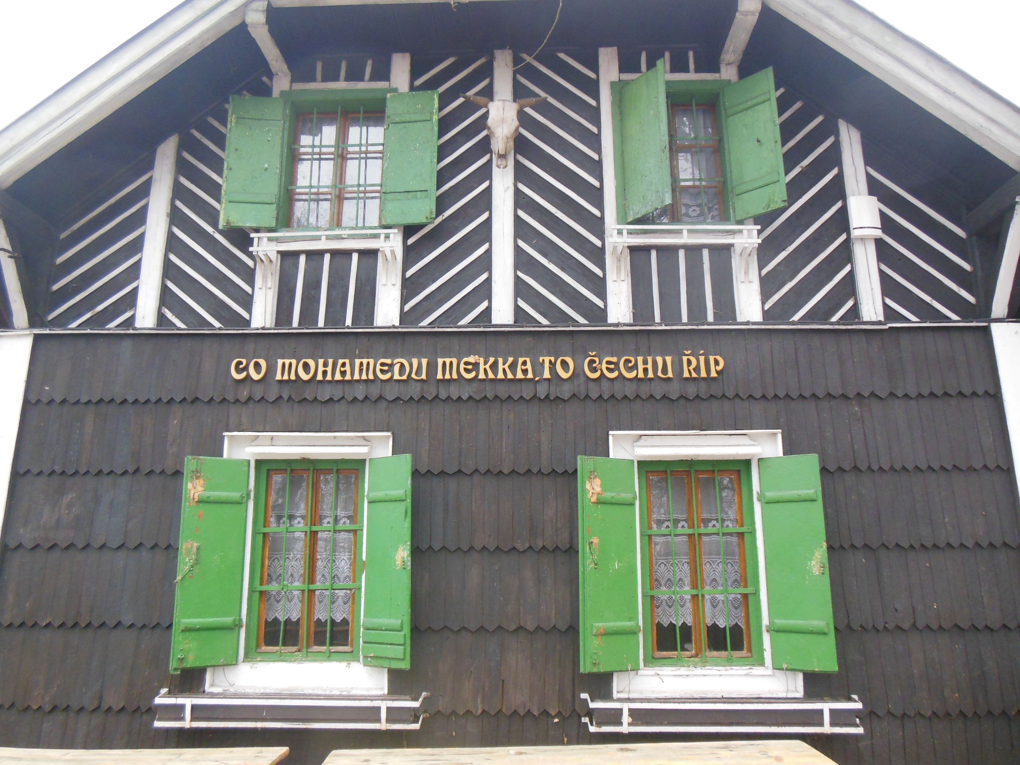 Mnetěš (okres Litoměřice). Hora Říp, Boumova chata č. p. 125.